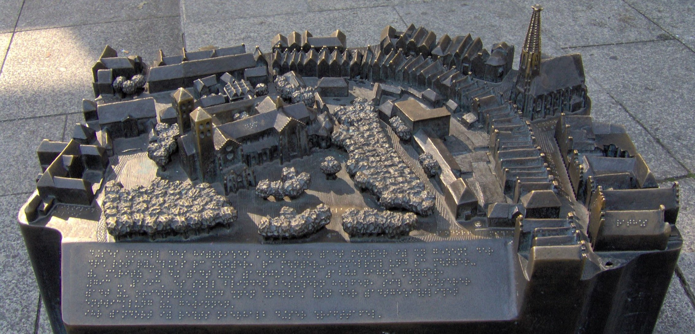 Bronzemodell der Stadt Münster auf dem Domplatz. Künstler: Egbert Broerken